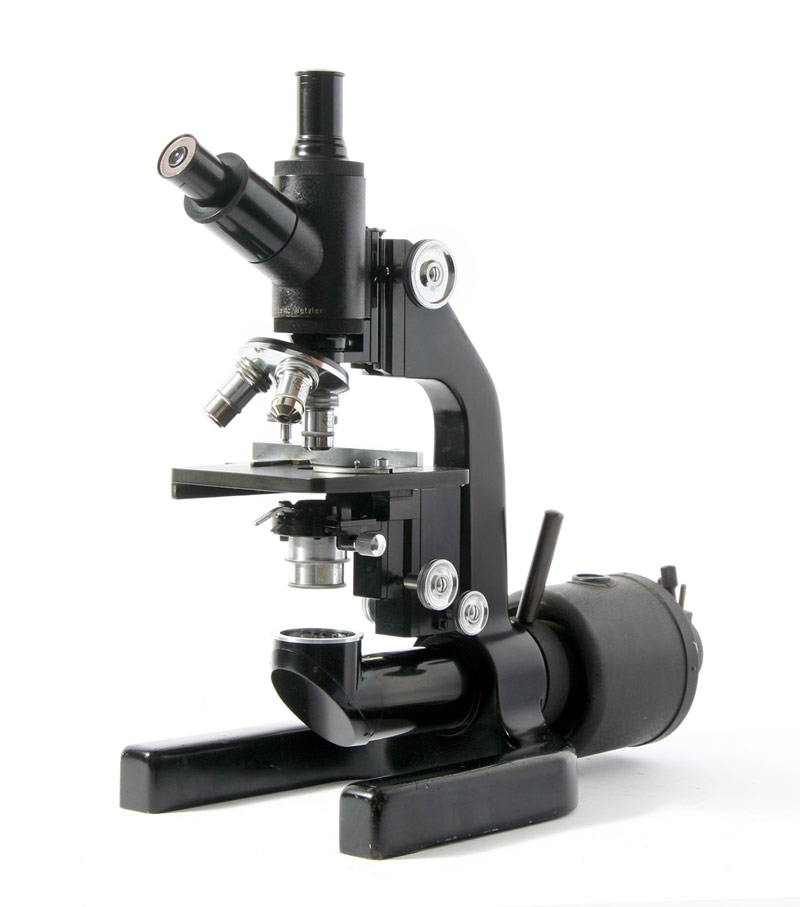 Leitz „Monokular-Binokulares Laboratoriums-Mikroskop“ (MBLM)